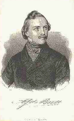 Portret van Abraham Johannes de Bull, Willem Frederik Wehmeyer, Arie Cornelis Kruseman, 1842 - 1873